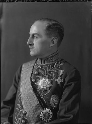 Retrato del embajador Manuel de Freyre y Santander